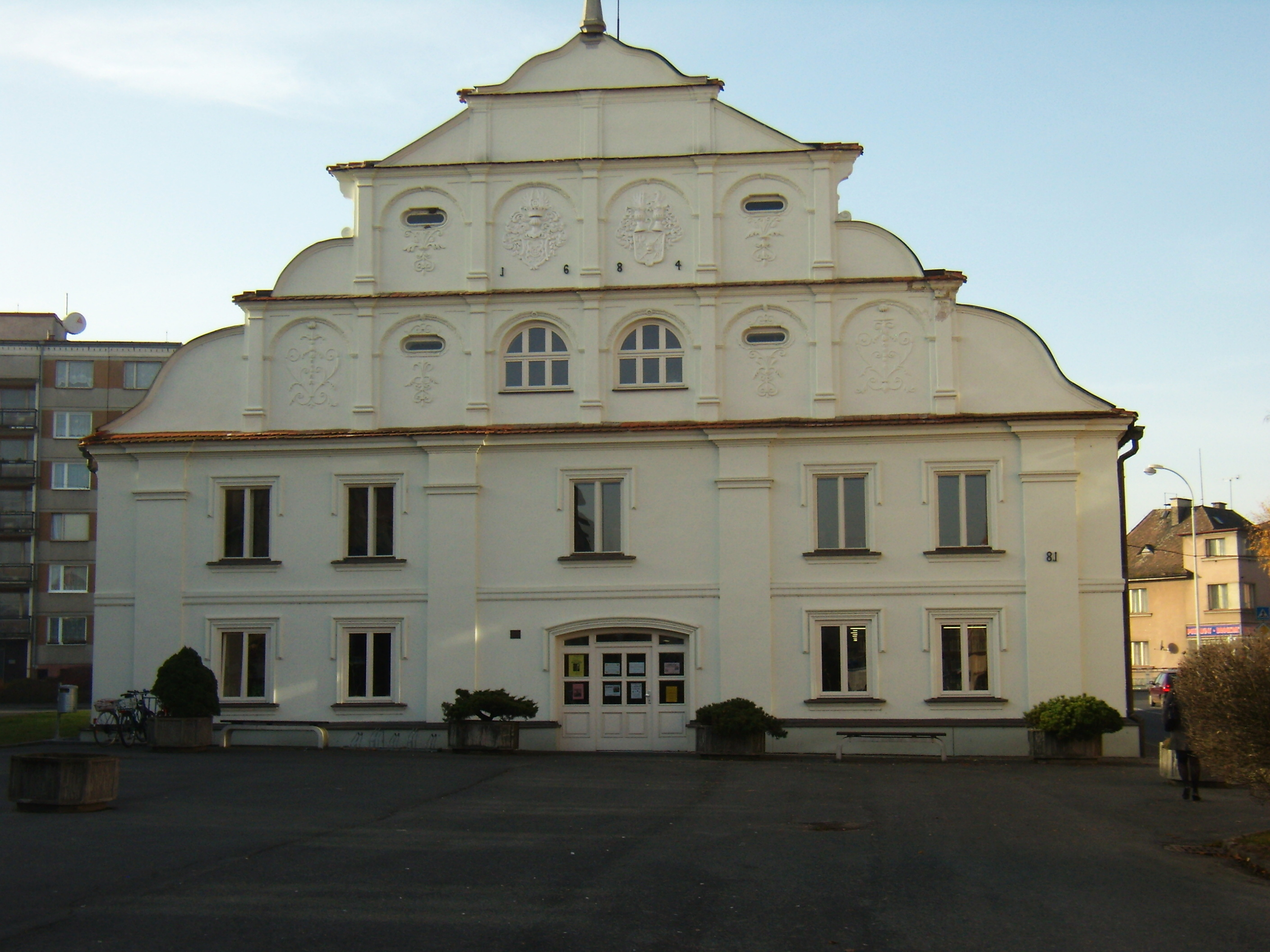 Nýrsko muzeum